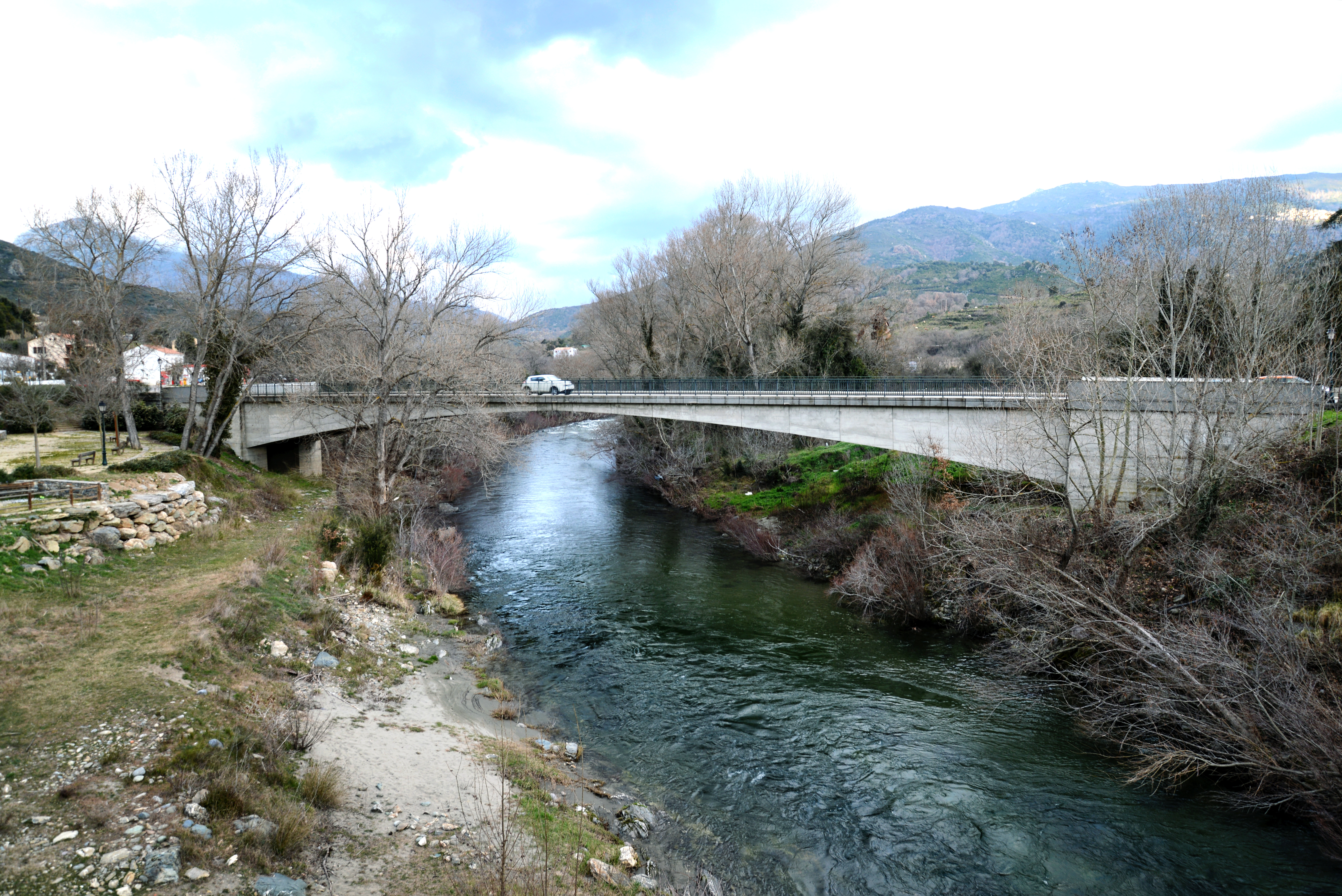 Castello-di-Rostino, Rustino (Corse) - Pont de la RN 193 sur le Golo